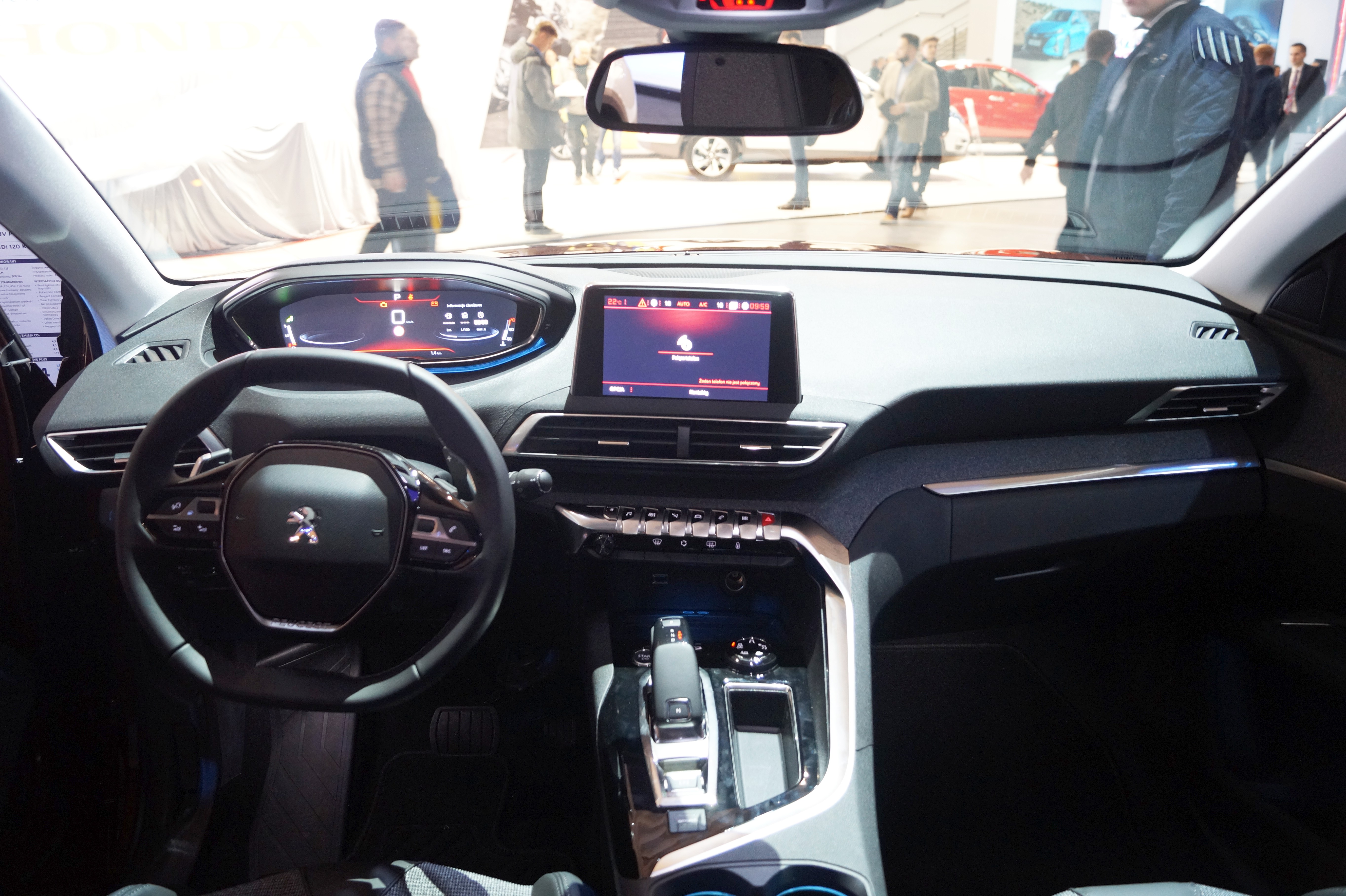 Wnętrze Peugeota 3008 na Motor Show Poznań 2017.